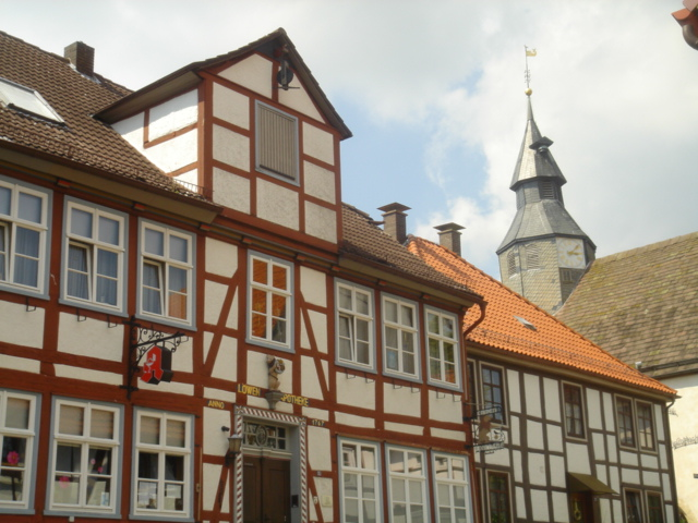 Löwenapotheke in der Brauergildestraße 21, schllichtes Traufenhaus mit klassizistischer Haustür, bezeichnet 1767. (zit. nach im Hintergrund Turm der ev.-ref. KircheThis is a photograph of an architectural monument., no. 0